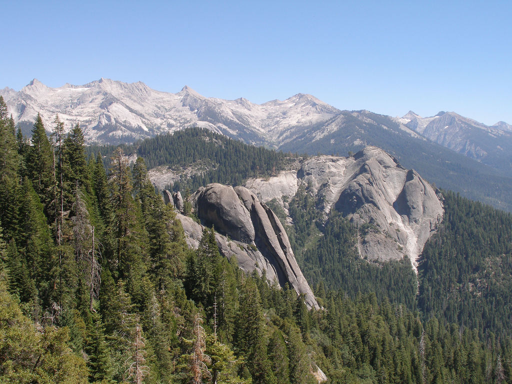 Sequoia NP, California, USA